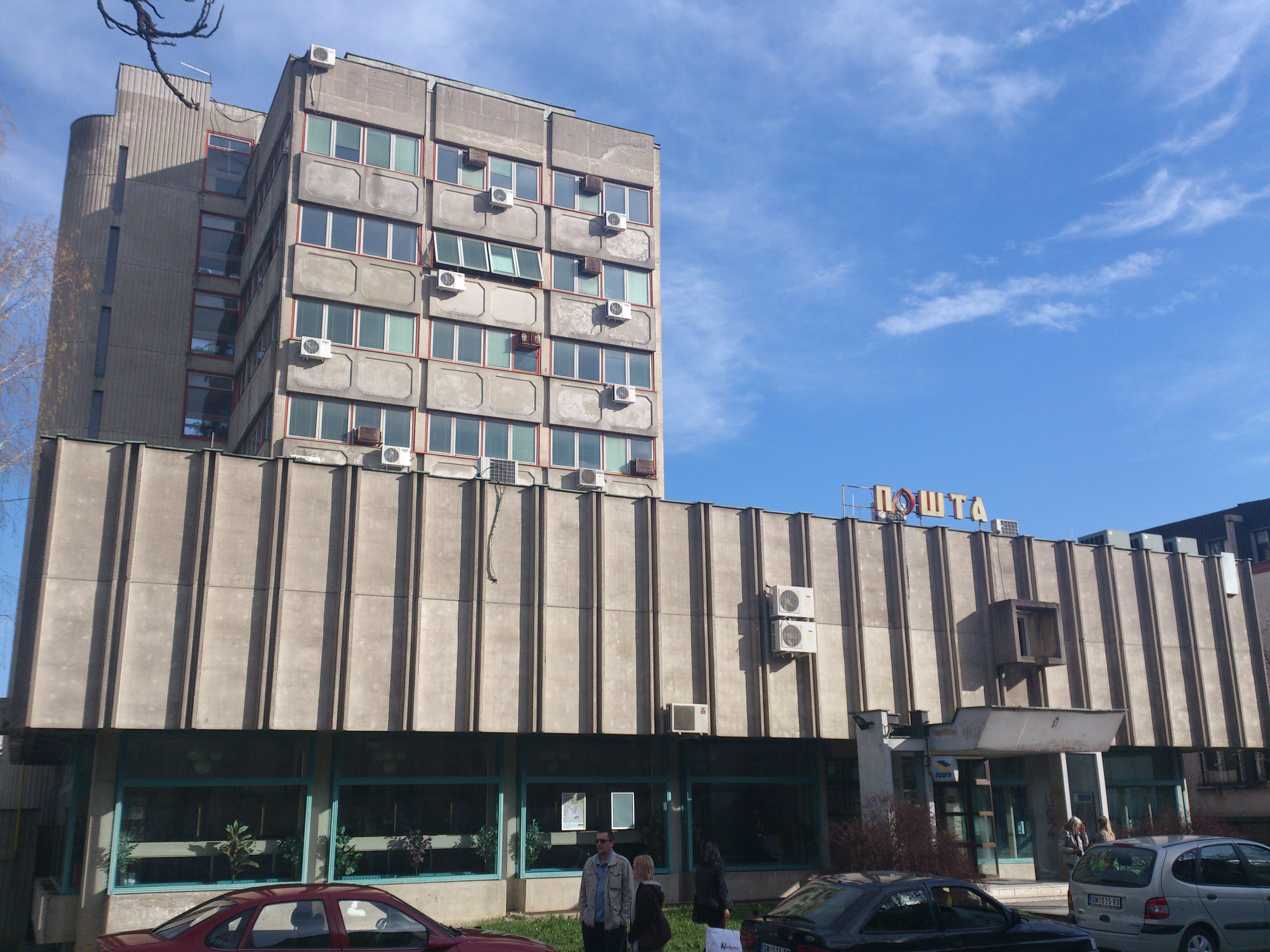 Зграда Поште у Горњем Милановцу.